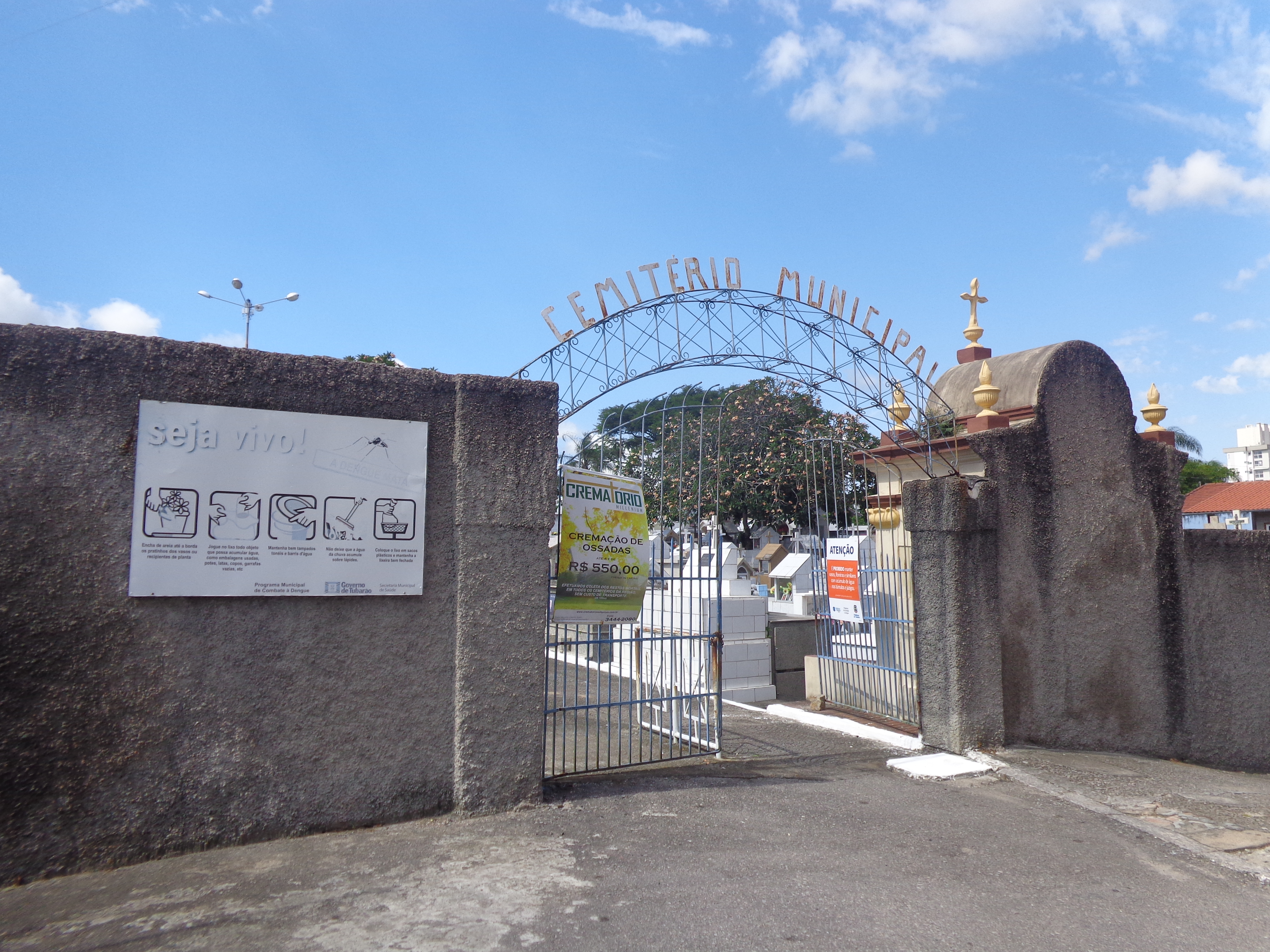 Entrada do Cemitério Municipal de Tubarão, Santa Catarina